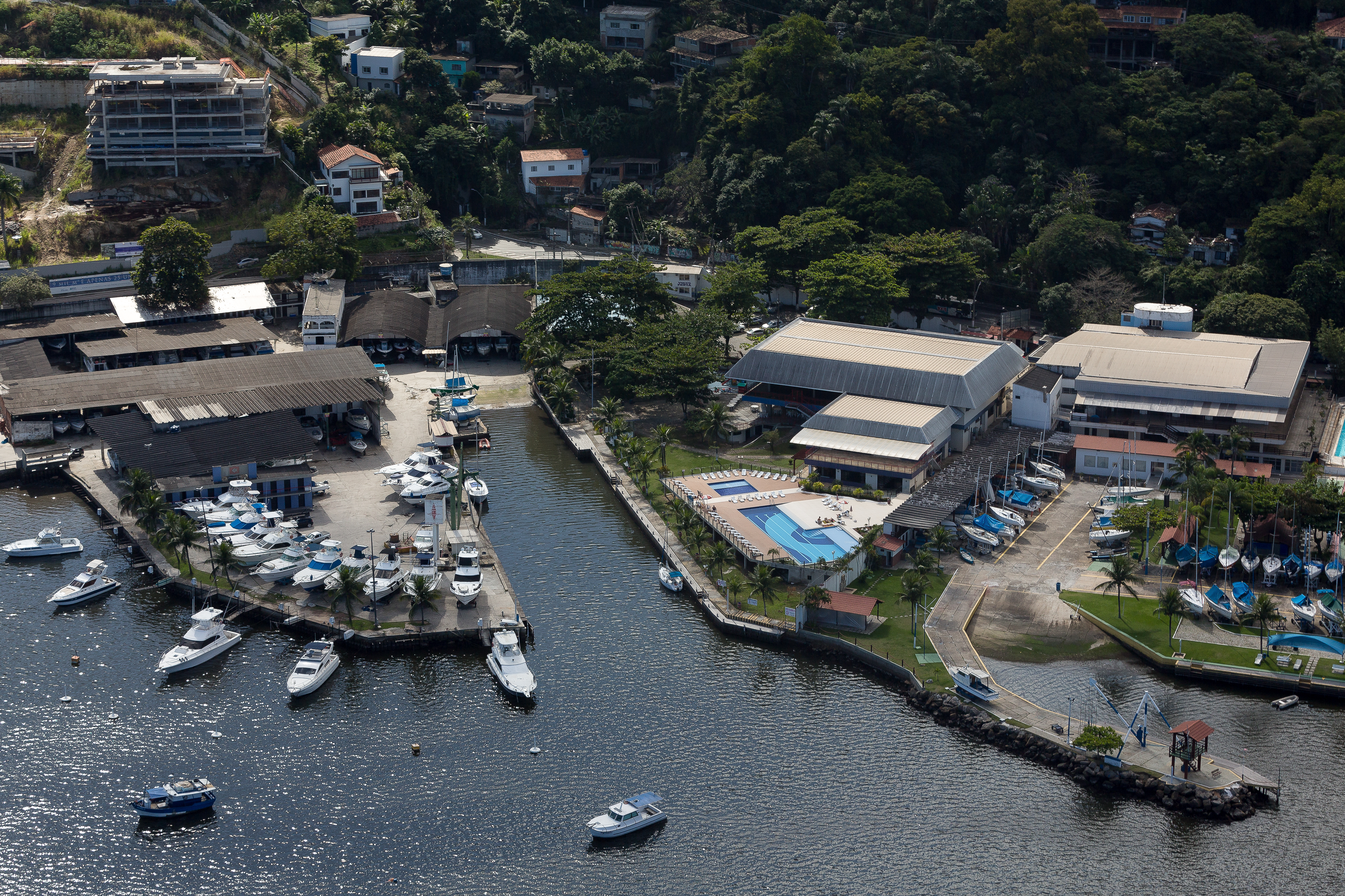 Vista aérea do Iate Clube Icaraí localizado na cidade de Niterói, RJ - Brasil.